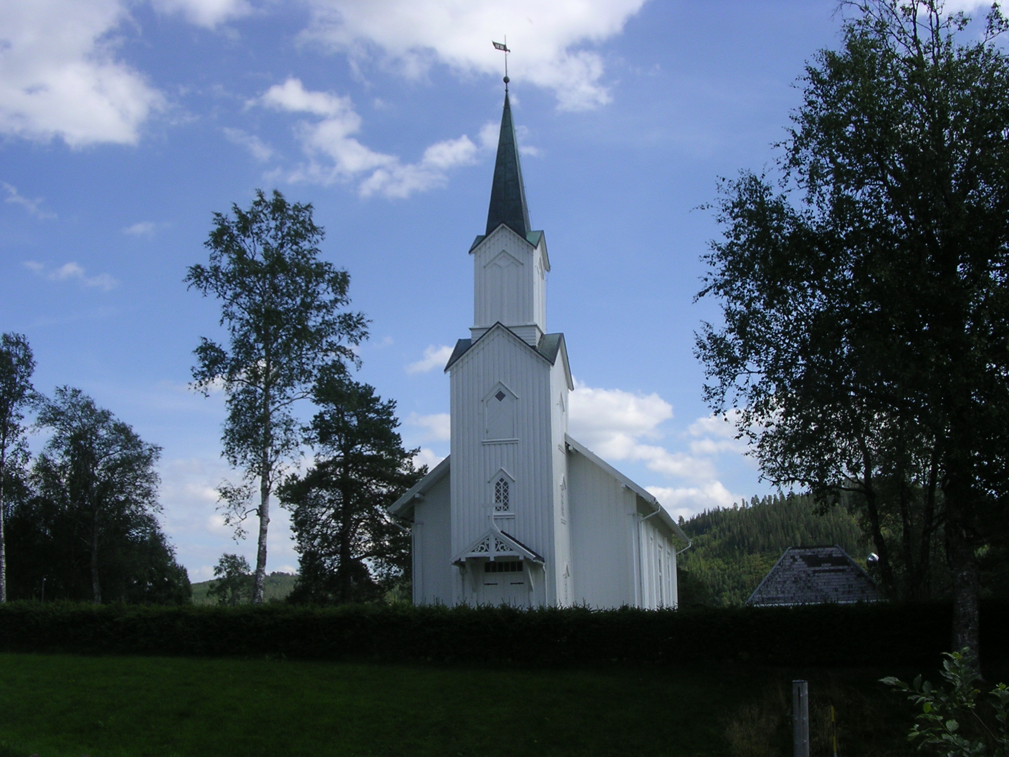 Harran kirke i Grong kommune i Nord-Trøndelag